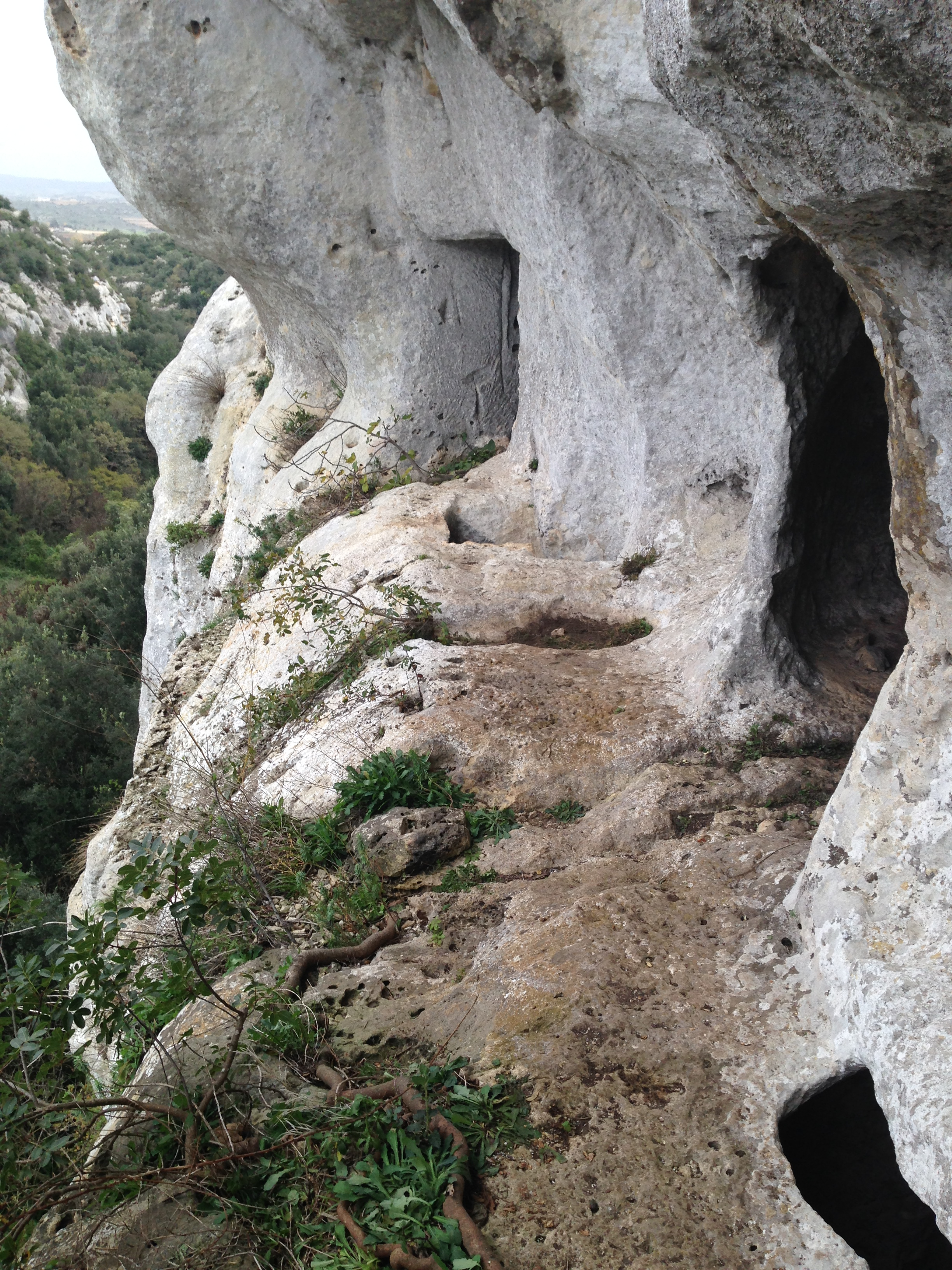 Finestre